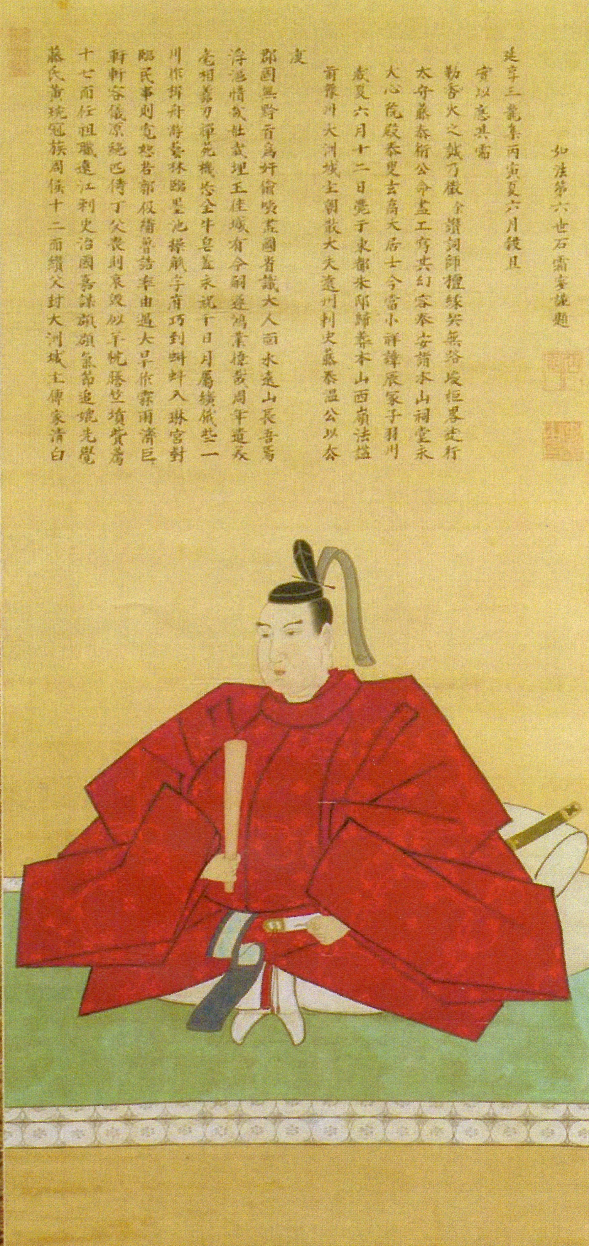 加藤泰温の肖像。